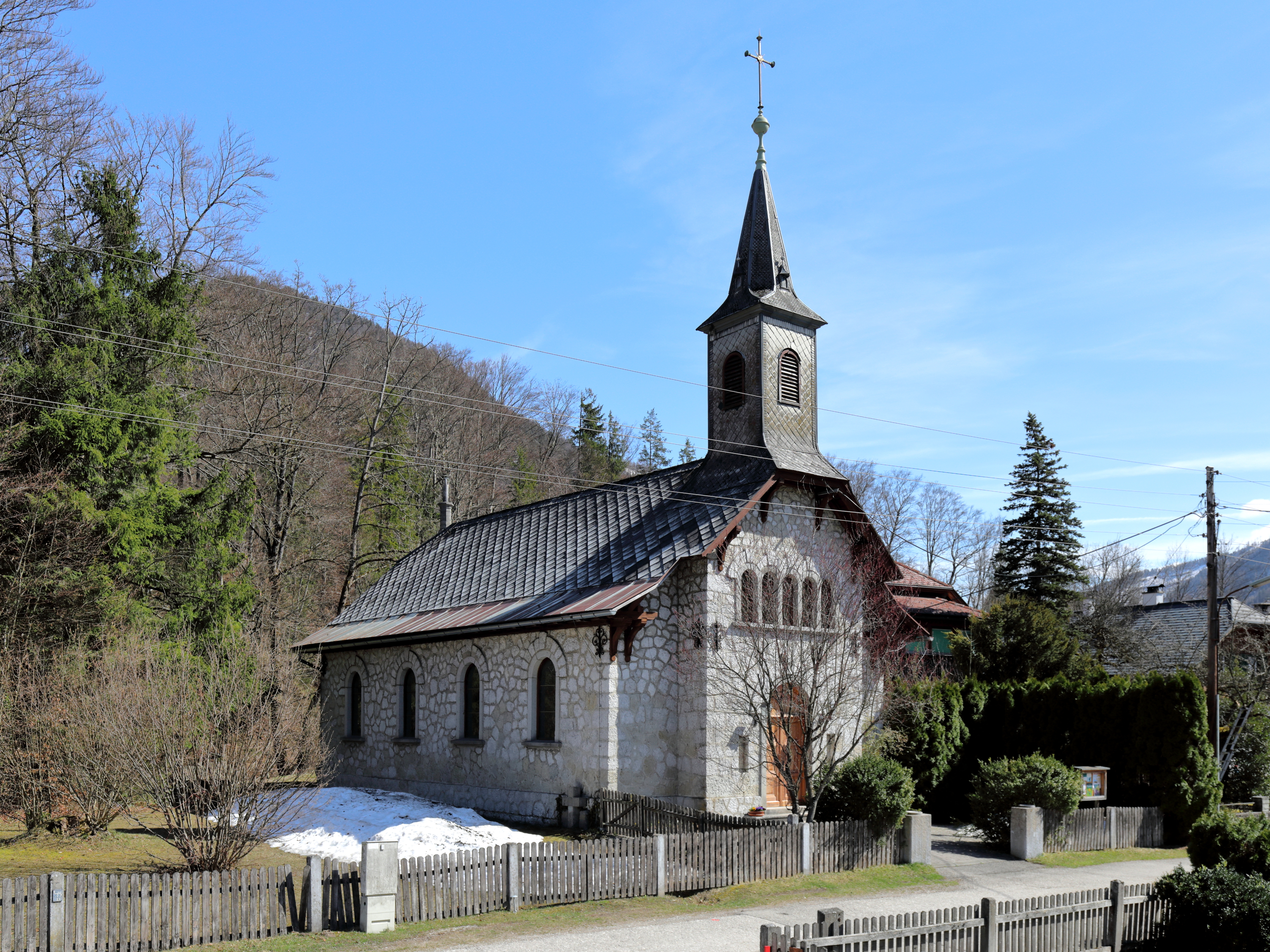 Nordwestansicht der Pfarrkirche der evangelischen Pfarrgemeinde Ausseerland in der steirischen Stadtgemeinde Bad Aussee. Die Jesuskirche wurde vom Baumeister Max (auch Maximilian bzw. Massimiliano) Cordignano errichtet und 1908 geweiht.